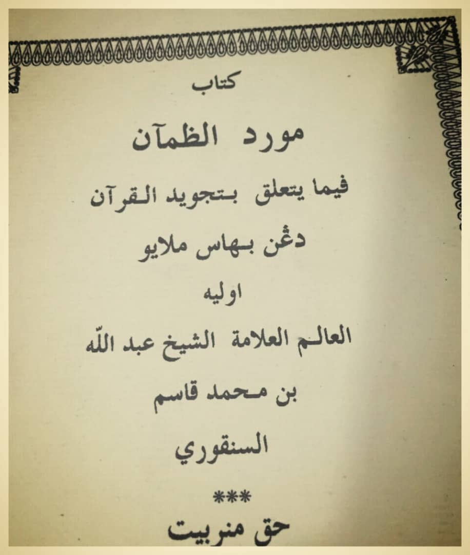 kitab karya Sheikh Abdullah bin Muhammad Qasim ( Tok Senggora )